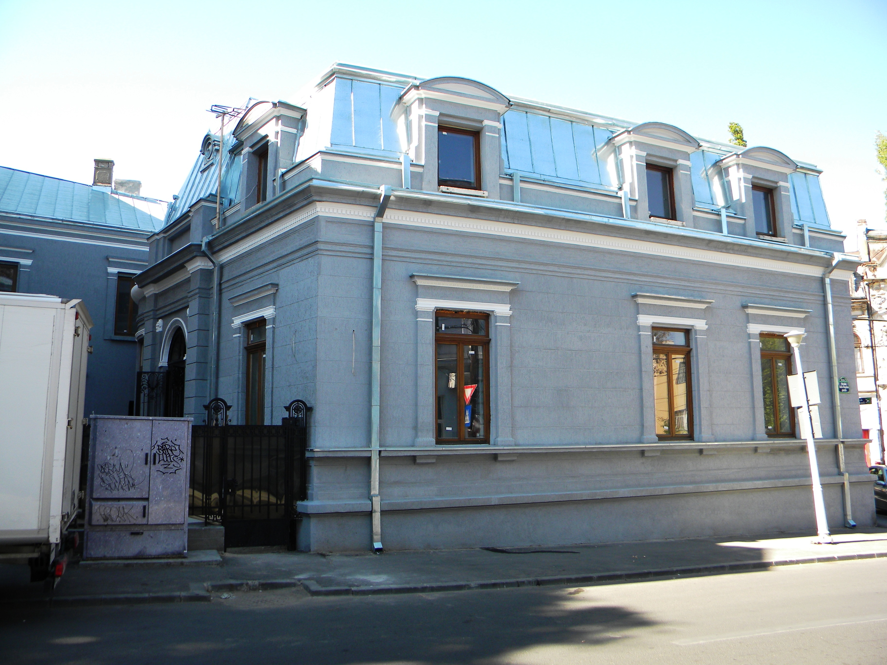 Bucuresti, Romania, Casa pe Str. Iulia Hasdeu nr. 15 sect. 1